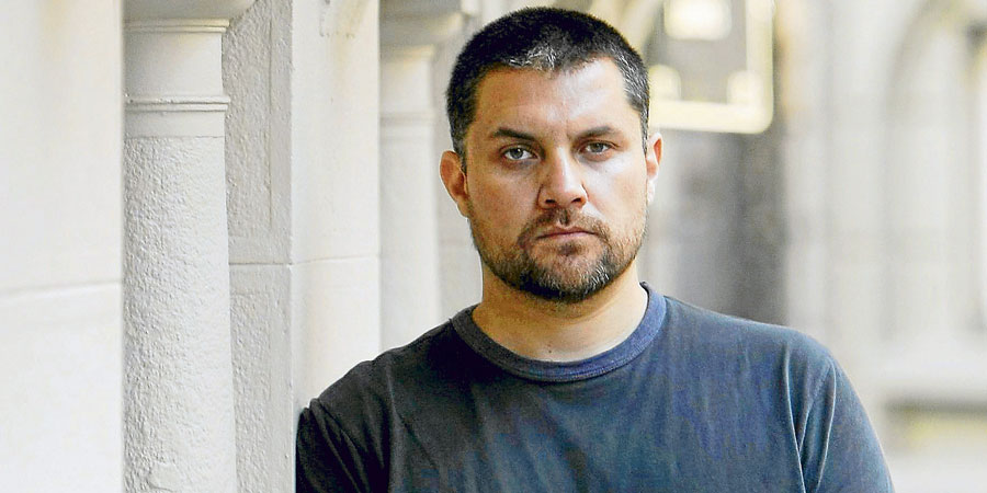 Entrevista dario La Tercera: Guillermo Calderón: “Quiero explorar la historia política y ciertos miedos atávicos de EE.UU.”